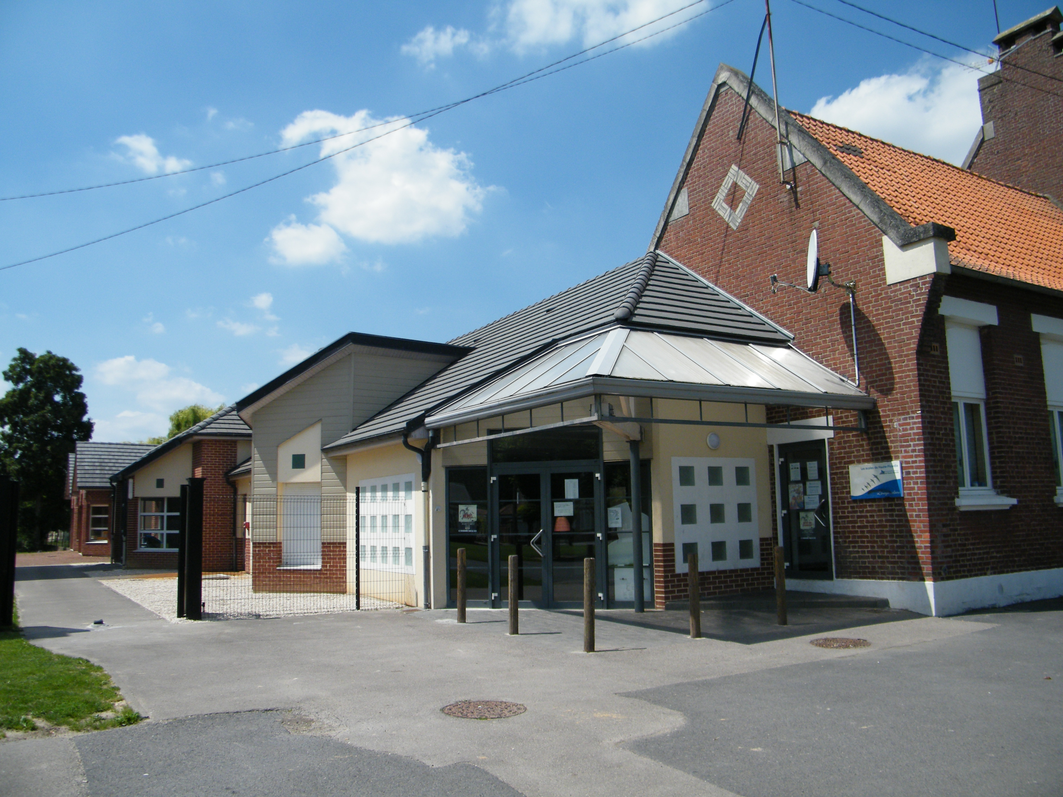 Entrée de l'école.